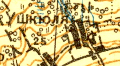 Топографическая карта Ленинградской области, квадрат О-35-12-Г (Ропша), деревня Тиммолово